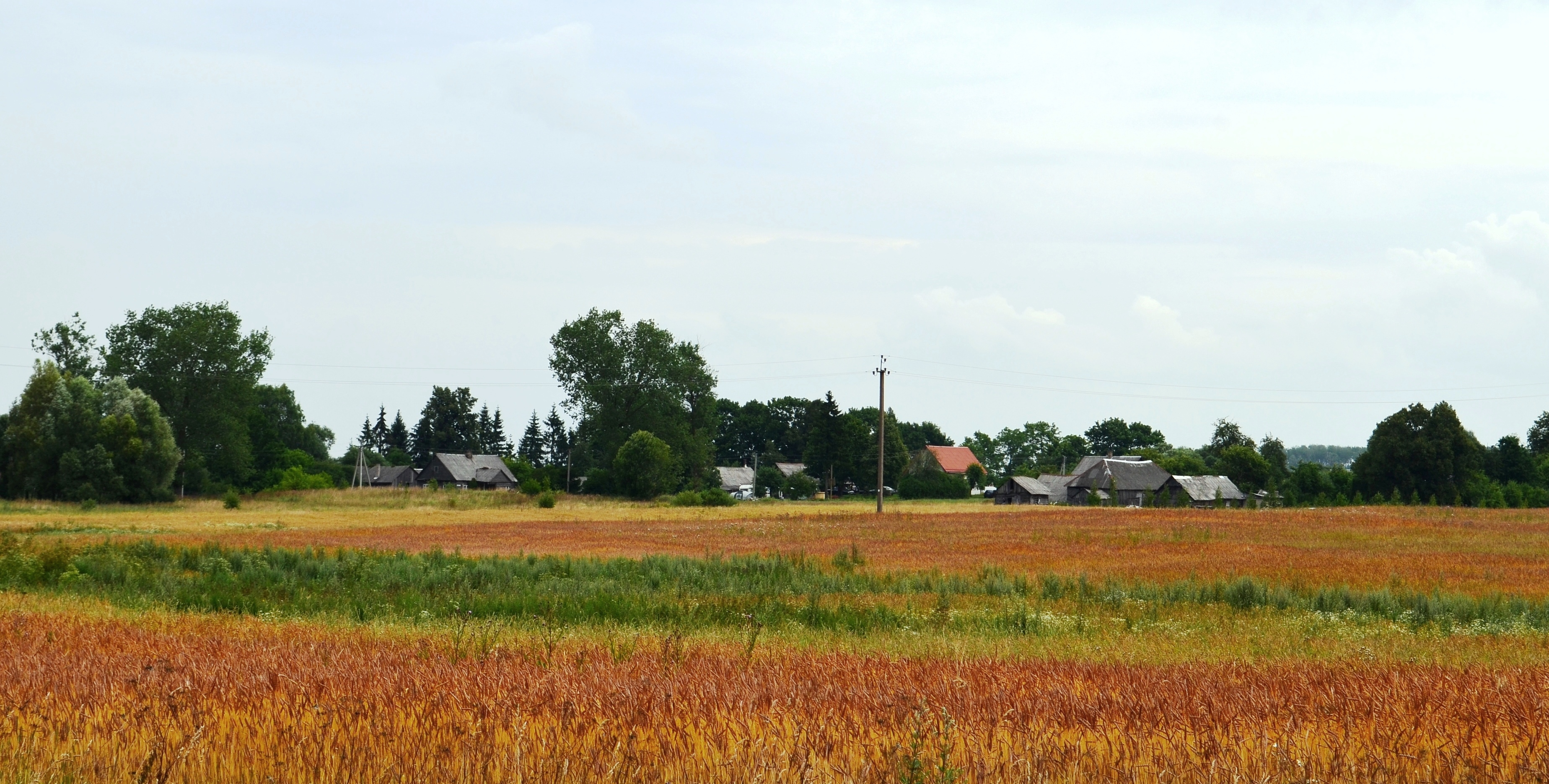 Kraujaleidžiai, Molėtų r.